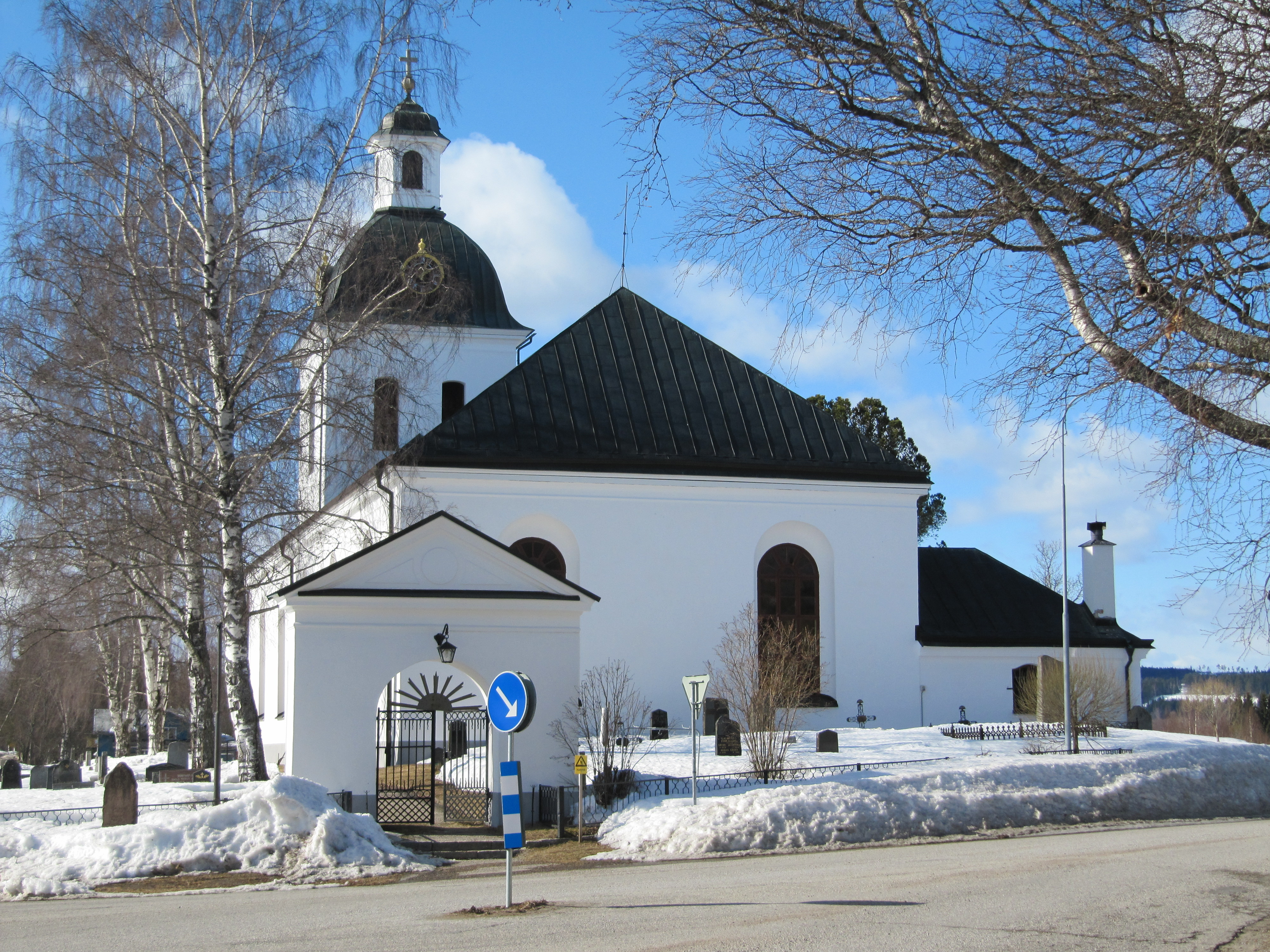 Gnarps kyrka